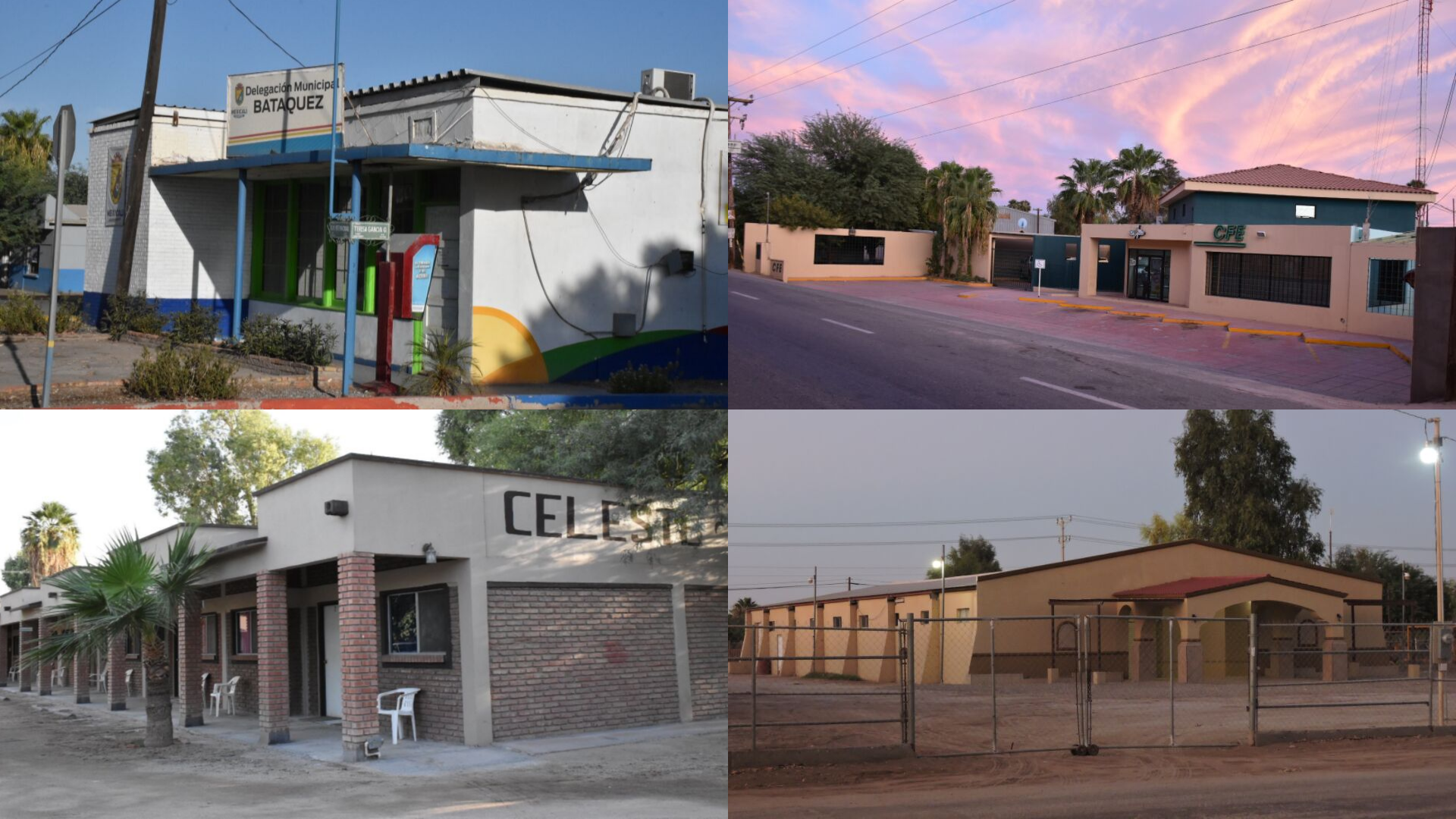 Edificios representativos e importantes del poblado Batáquez. De la parte superior izquierda se aprecia: la delegación municipal Batáquez, una oficina de la comisión federal de electricidad (CFE), el Hotel Celeste, y un salón de eventos que se ubica en el Ejido Monterrey (Batáquez) del Valle de Mexicali.